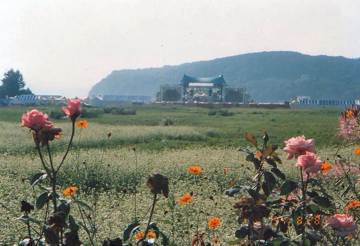 Mount Fuji Jazz fess (マウント・フジ・ジャズ・フェスティバル). In Japan 1994.8.28.